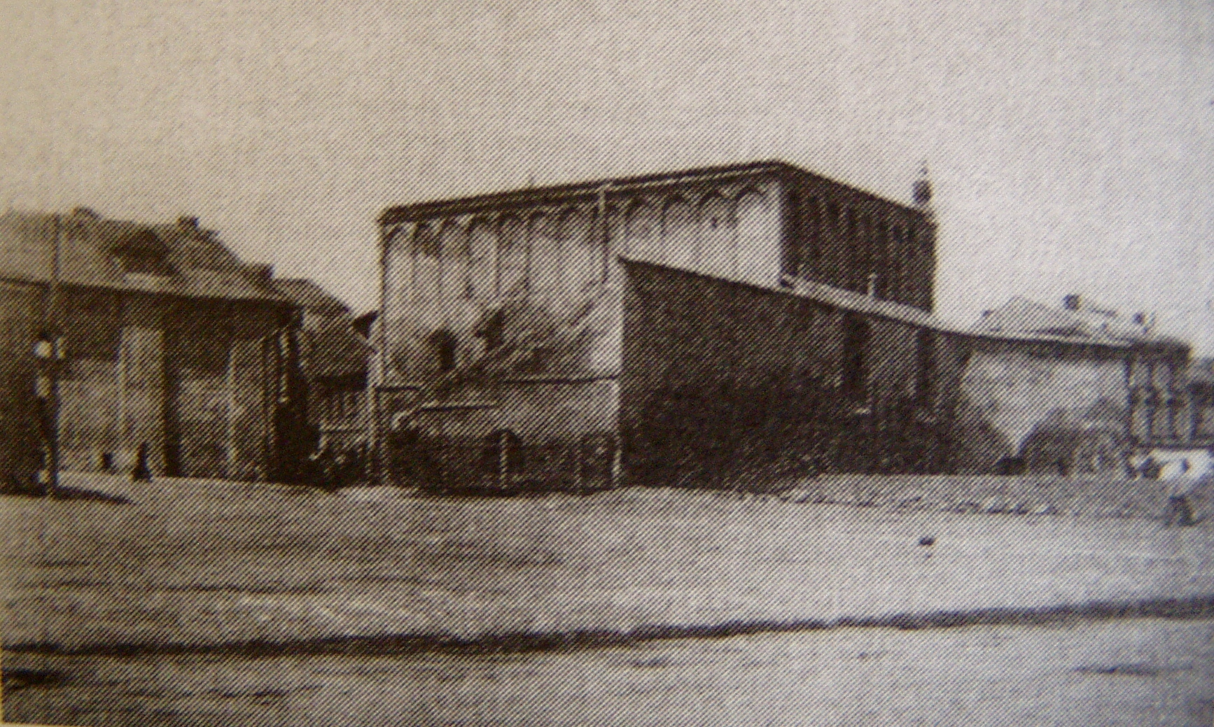 Stara Synagoga w Krakowie w 1891